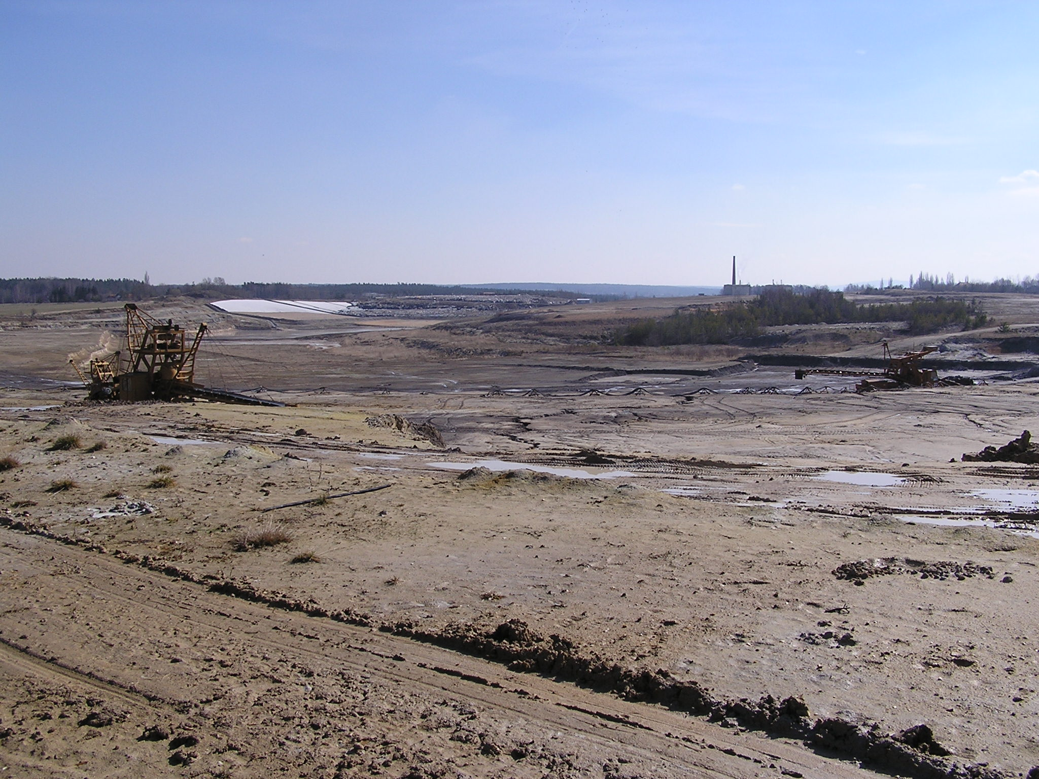 Křemelinový povrchový důl mezi Ledenicemi a Borovanami